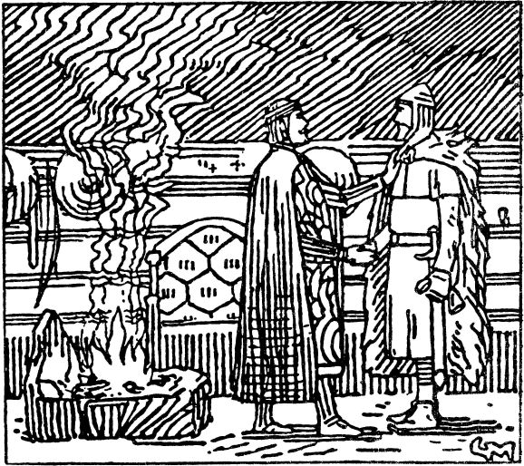 Gerhard Munthe: Illustration for Olav den helliges saga, Heimskringla 1899-edition. nn: «Kong Olav sender Karle på Bjarmelandsferd.»